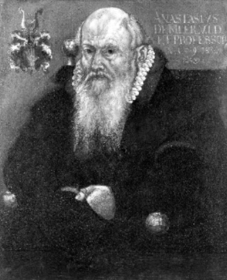 Anastasius Demler, Ölgemälde 1590